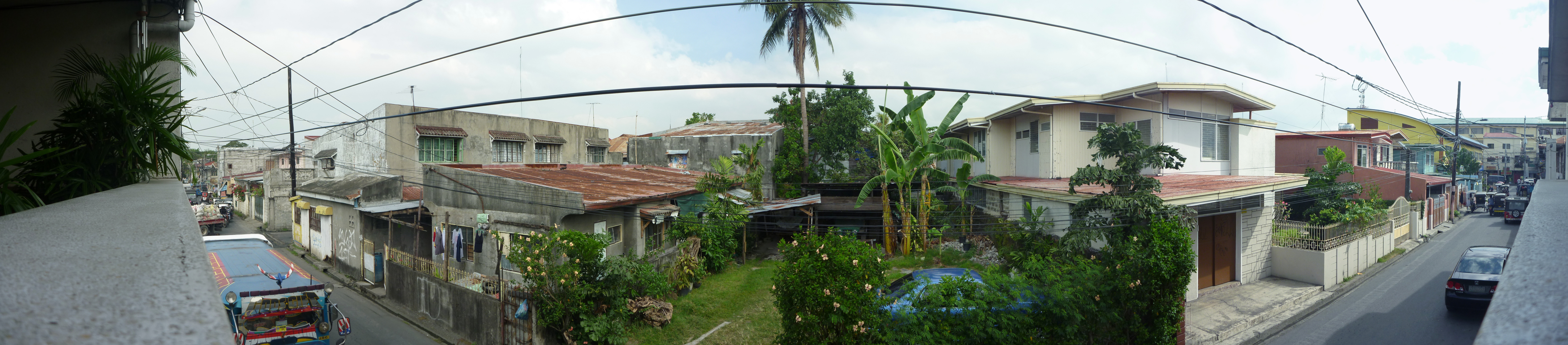 p.gomez st